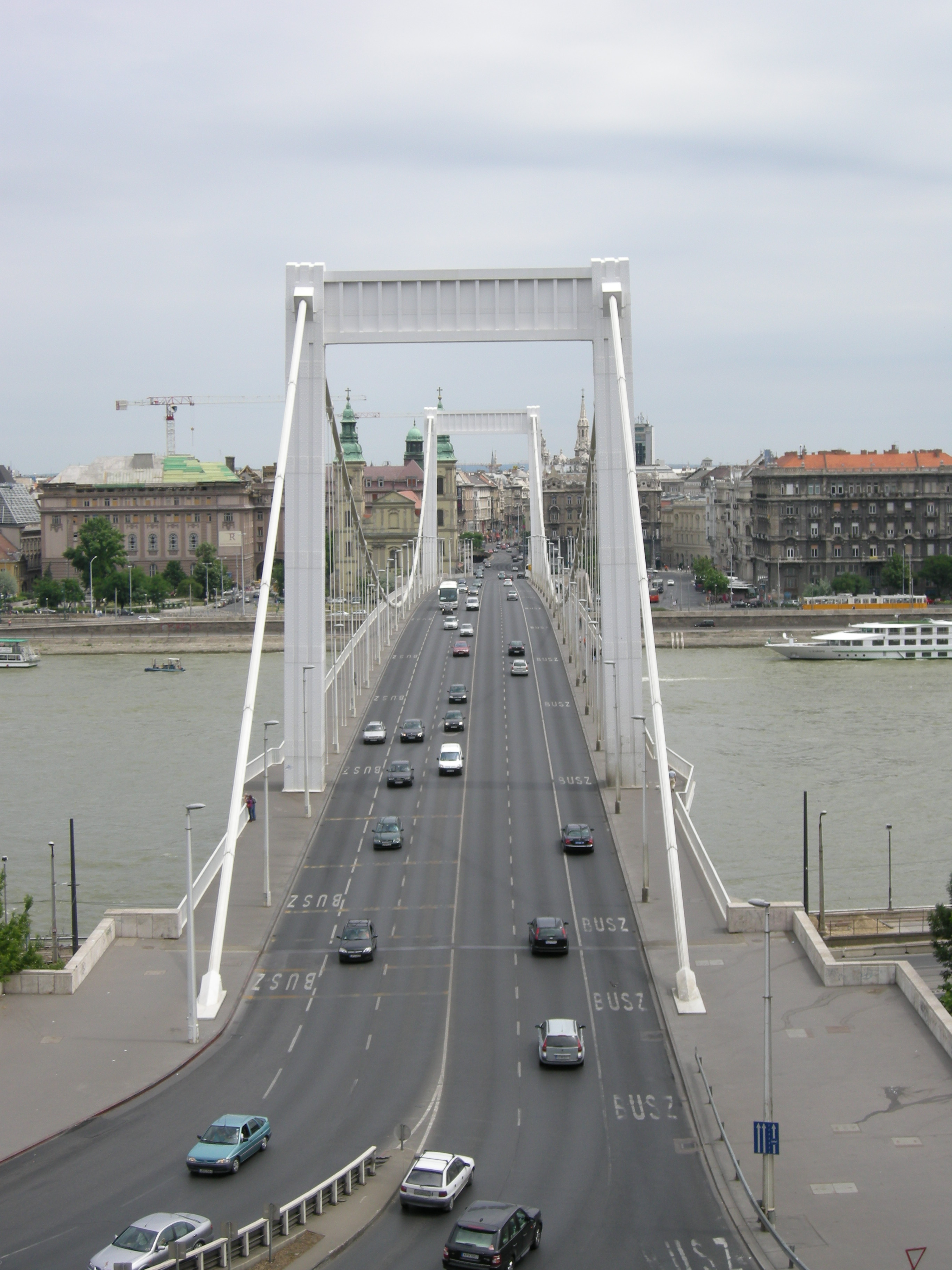 Budapest